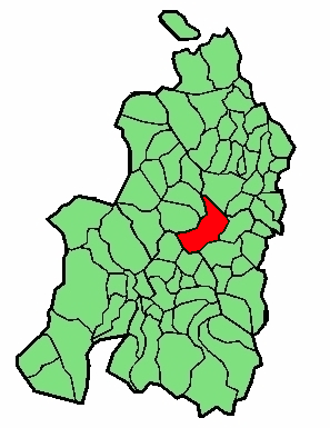 aipaturiko udalerriaren kokapena Nafarroa Beherean